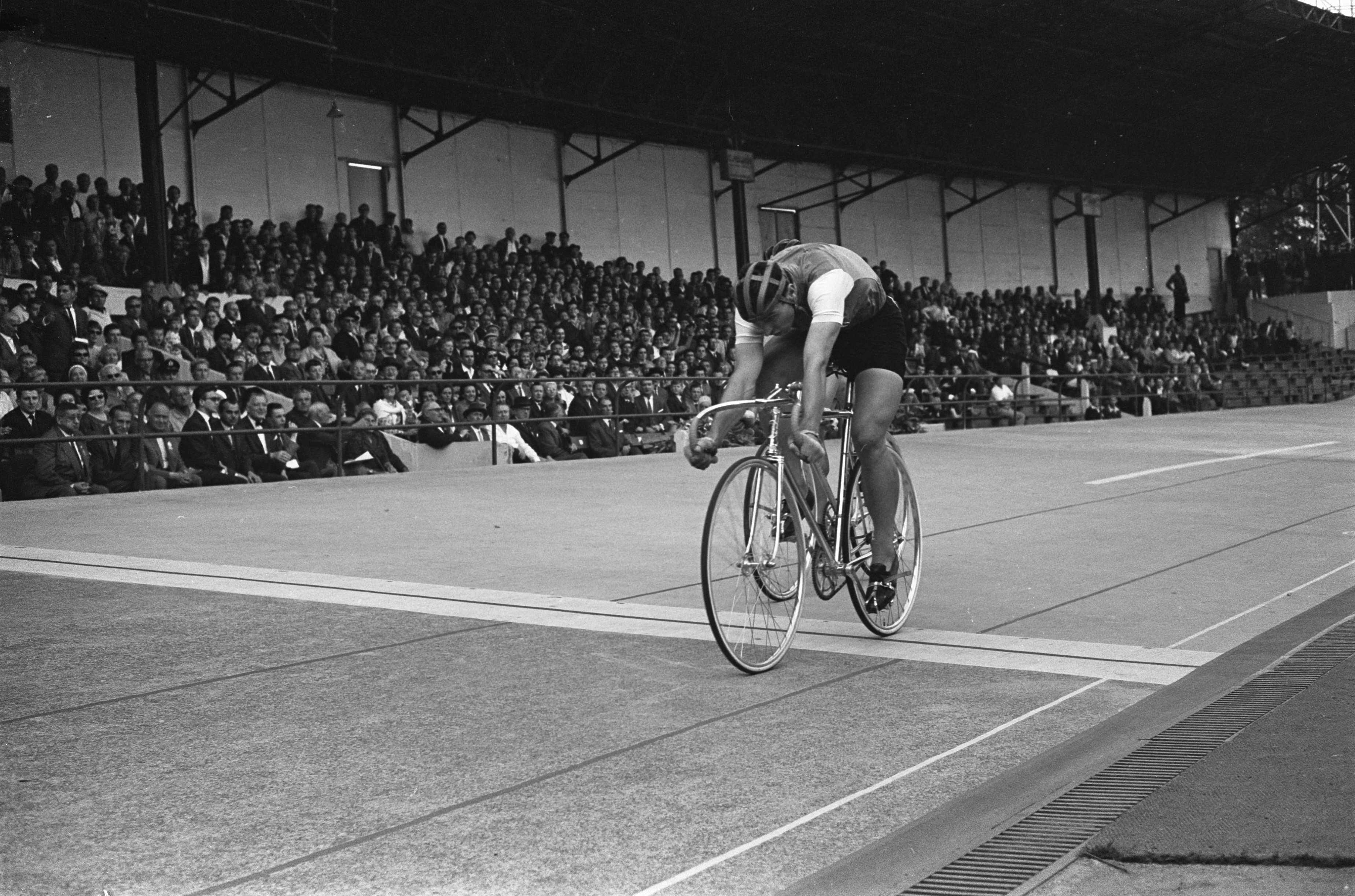 Collectie / Archief : Fotocollectie Anefo Reportage / Serie : [ onbekend ] Beschrijving : Wereldkampioenschappen te Recourt. Bianchetto als eerste over de streep met achter Sercu. Finale amateurs Datum : 4 augustus 1963 Trefwoorden : wielrenners Fotograaf : Pot, Harry / Anefo Auteursrechthebbende : Nationaal Archief Materiaalsoort : Negatief (zwart/wit) Nummer archiefinventaris : bekijk toegang 2.24.01.05 Bestanddeelnummer : 915-3984